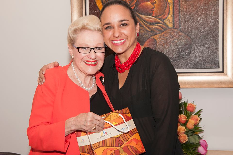 Quito, 13 enero de 2015.- Saludo protocolario de Bronwyn Bishop, jefa de la delegación de Australia es recibido por Gabriela Rivadeneira(ECUADOR), presidenta de la Asamblea Nacional y presidenta del 23º Foro Parlamentario Asia Pacífico